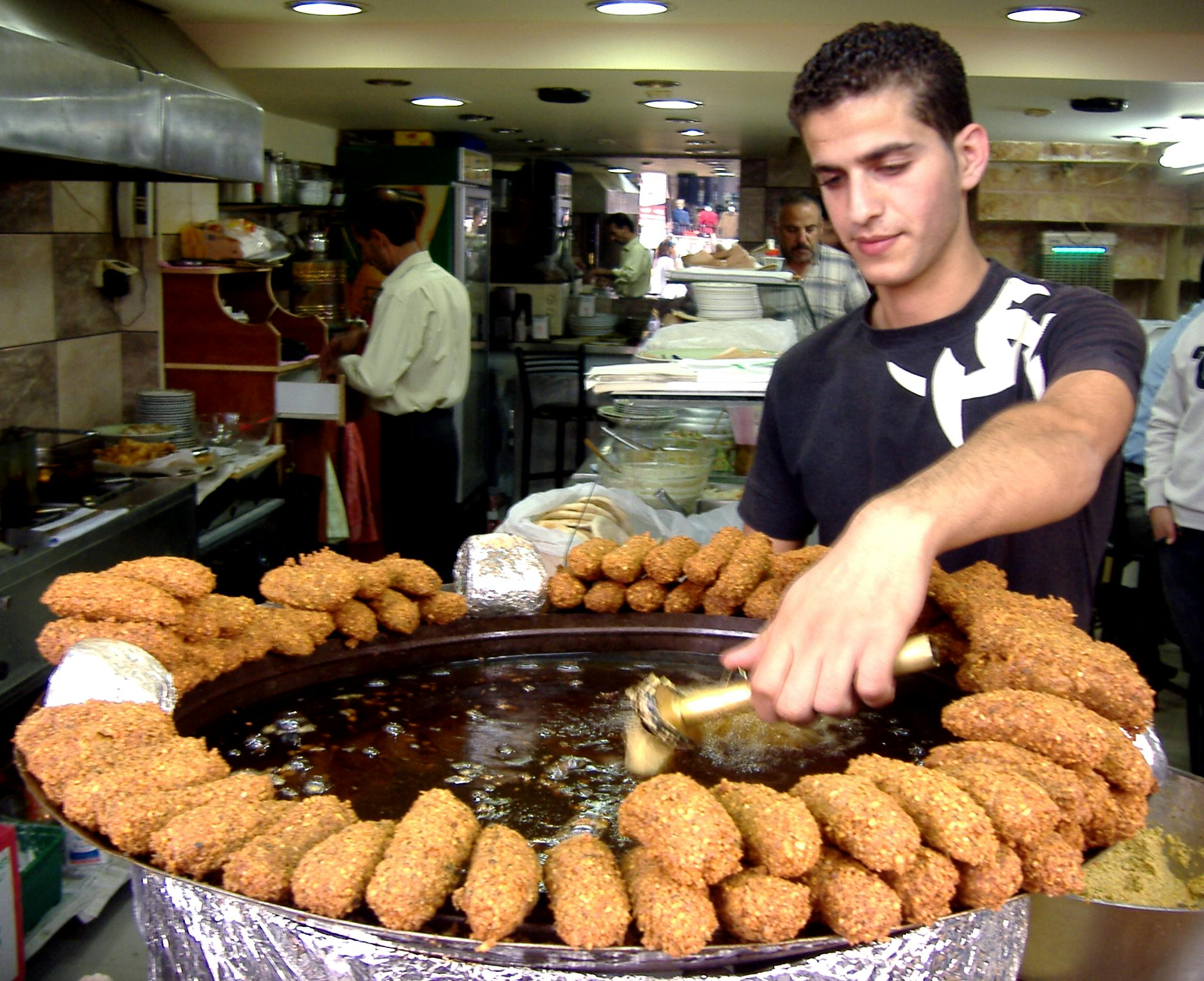 Falafel shop in Ramallah (West Bank)